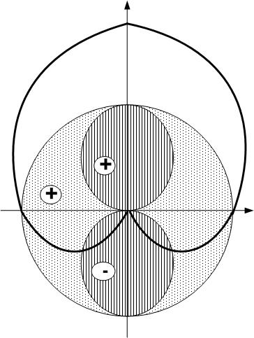 Viser en Limacon eller cardioide